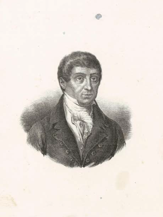 Dal Dizionario biografico degli uomini illustri di Sardegna di Pasquale Tola, 1837